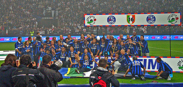 Quiete dopo la tempesta. Ho perduto tre anni di vita nel volgere di 45 minuti. Maledetti, adorati ragazzi...